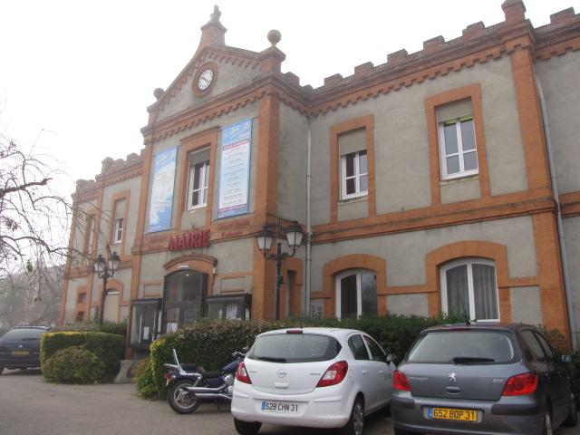 Mairie de Saint-Orens-de-Gameville (Haute-Garonne, France).